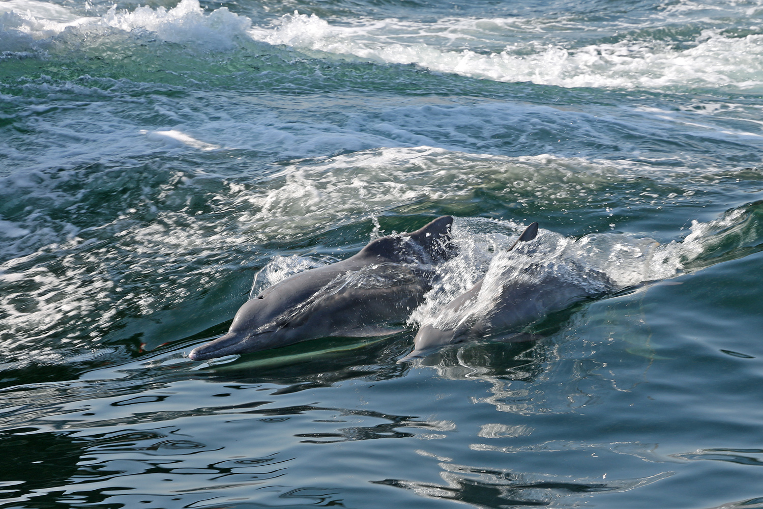 Dolphins near Khasab, Oman